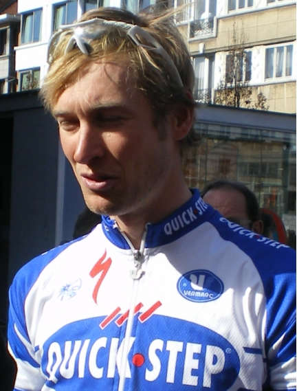 Jurgen Van De Walle - 3daagse van West-Vlaanderen